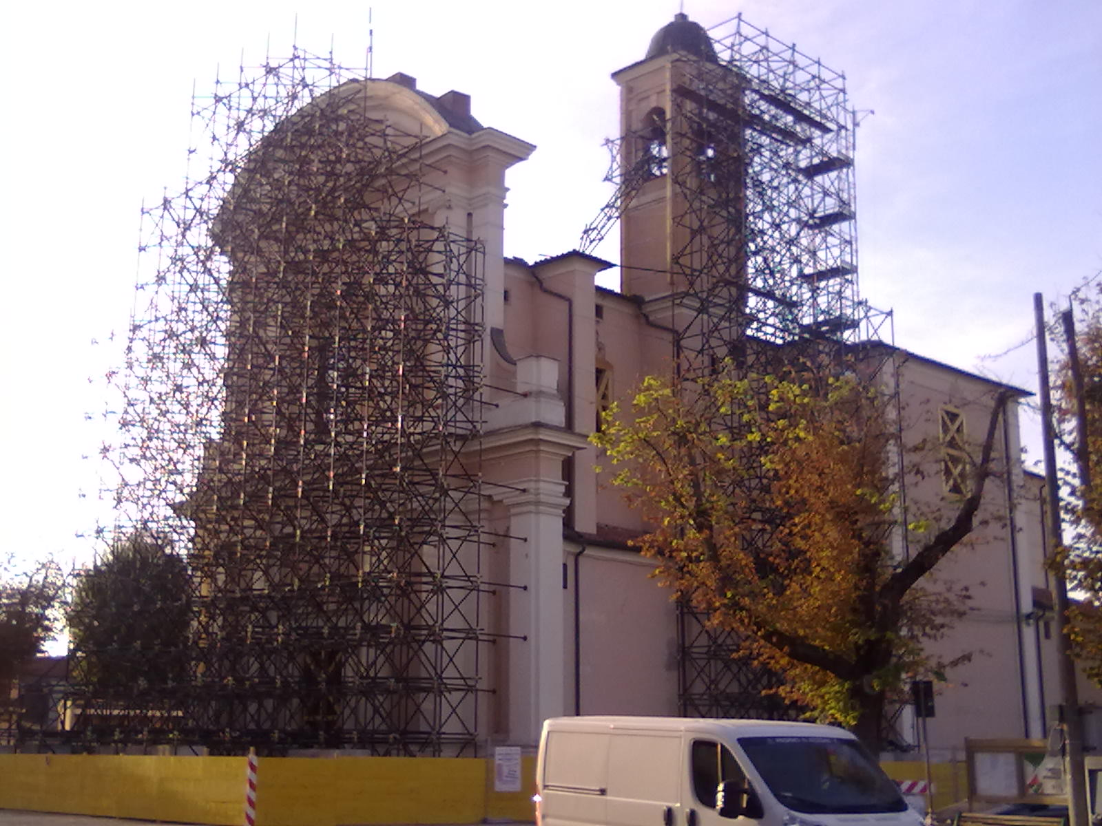 Intervento di messa in sicurezza della Chiesa Parrocchiale di Poggio Rusco, uno dei comuni maggiormente colpiti dal sisma nella Provincia di Mantova